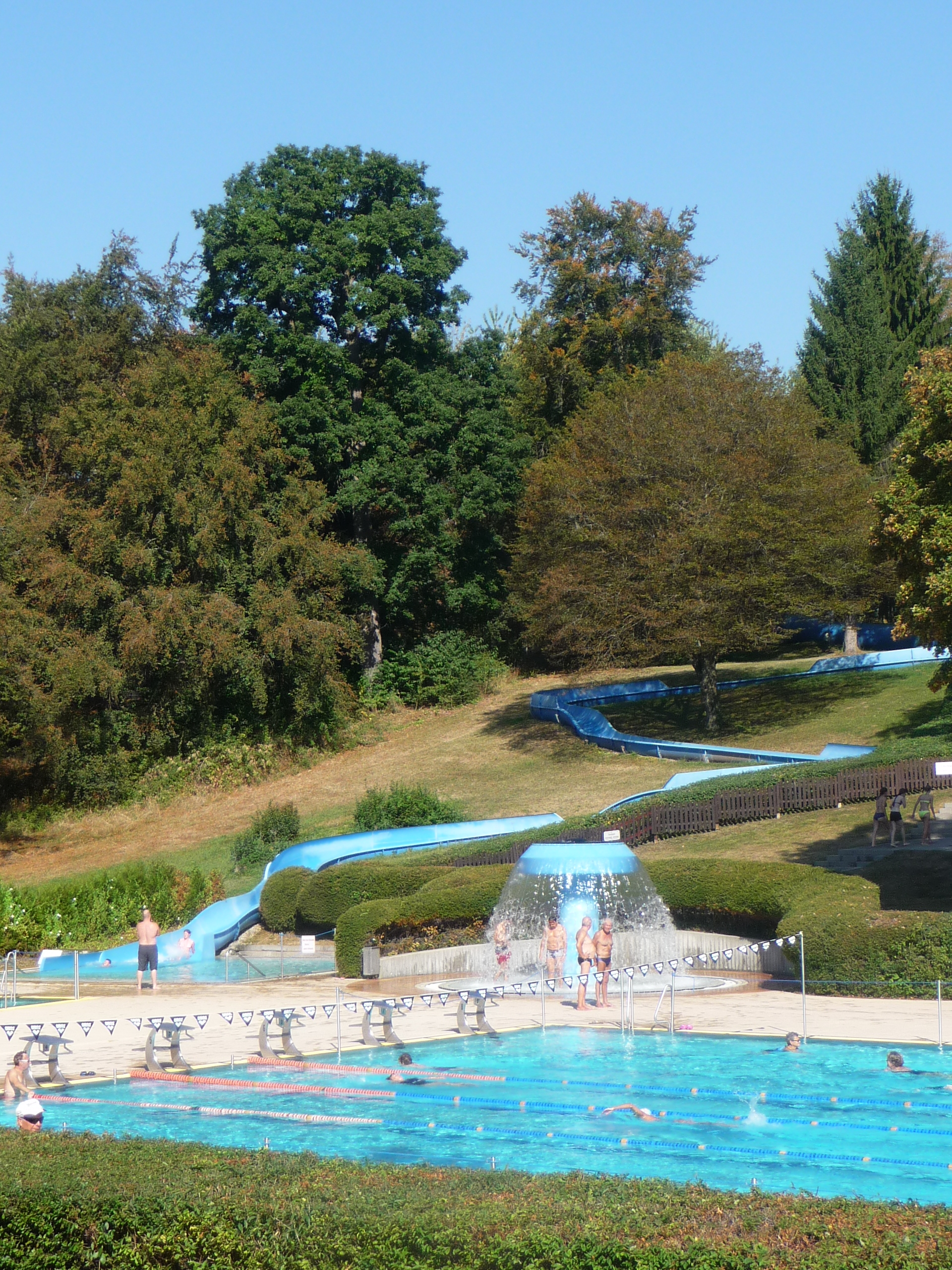 Badezentrum Sindelfingen – Wasserrutsche und Wasserpilz